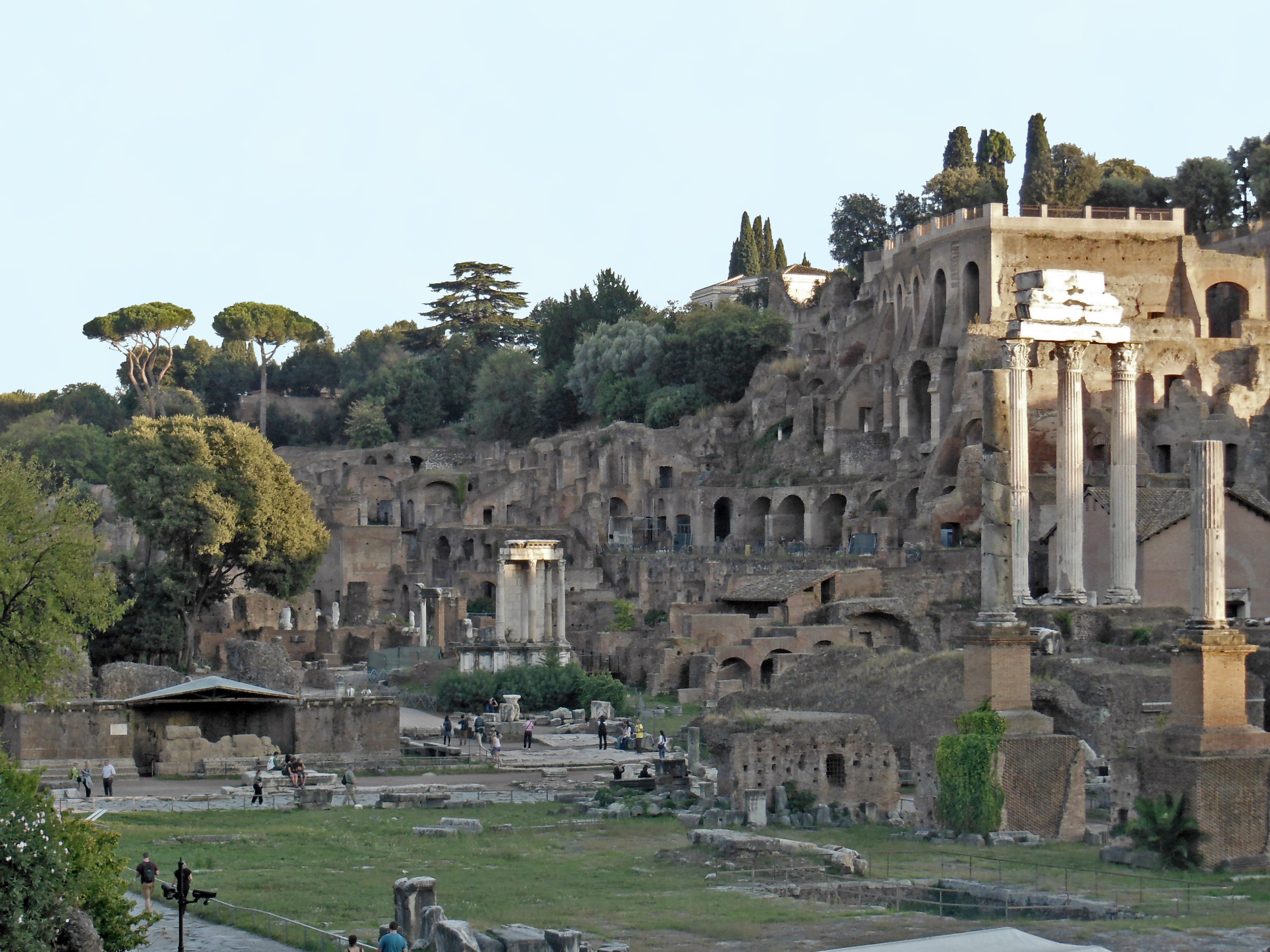 Roma, area archeologica del Foro Romano, il lato nord della piazza con il tempio del Divo Giulio, i resti dell'arco di Augusto, il tempio di Vesta e il tempio dei Castori dall'arco di Settimio Severo